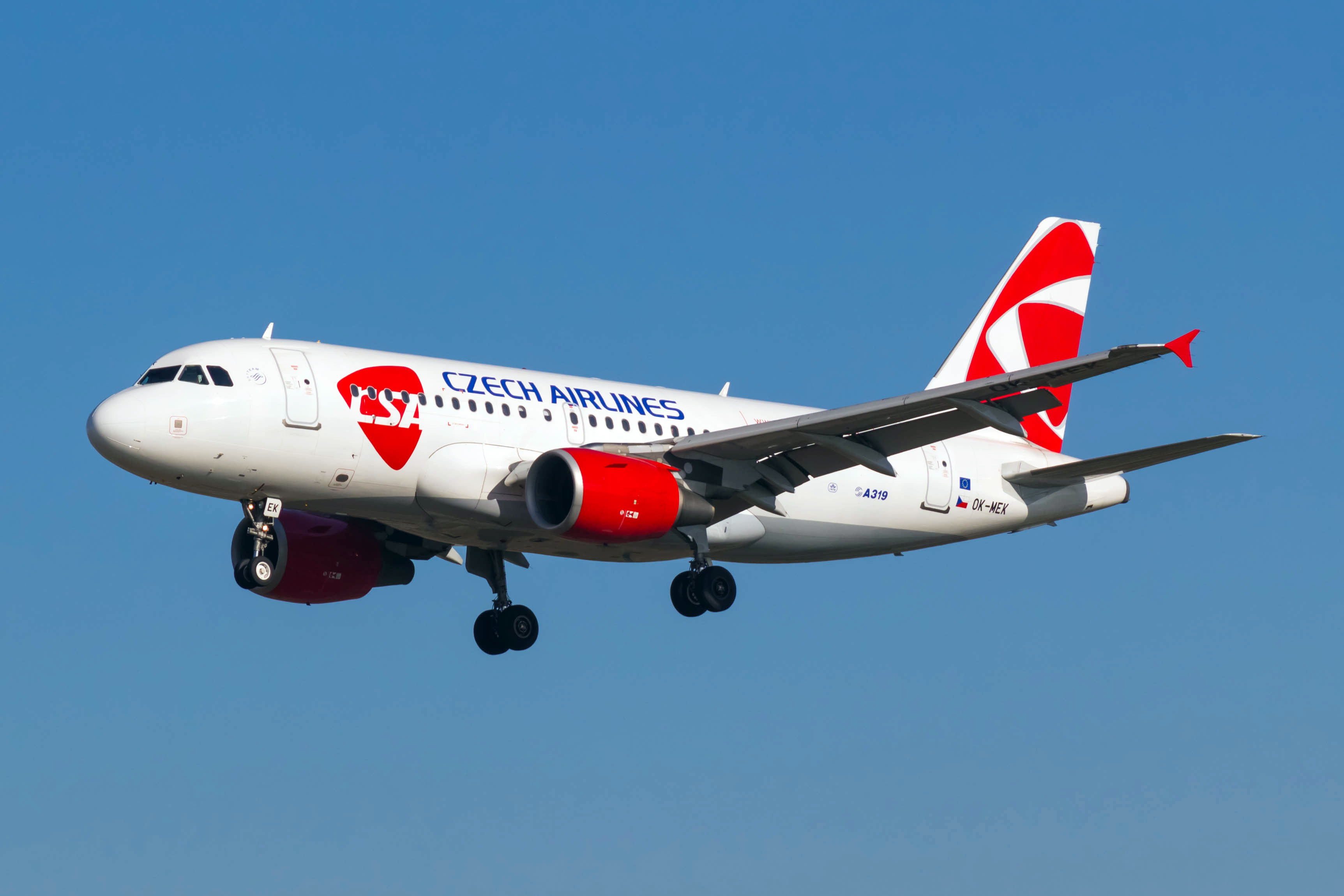 Airbus A319 de Vueling aterrando no aeroporto de Barcelona.